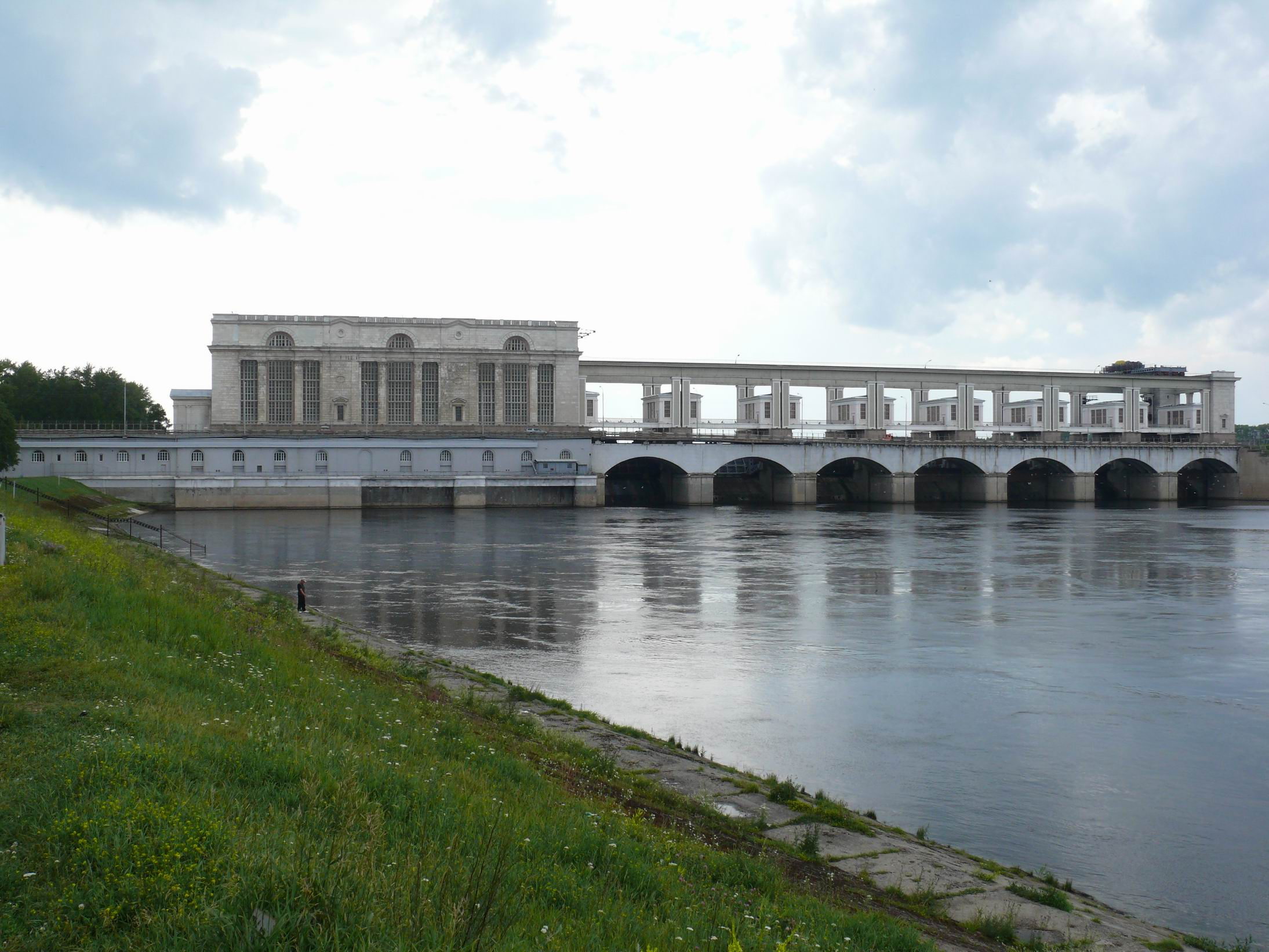 Угличская ГЭС